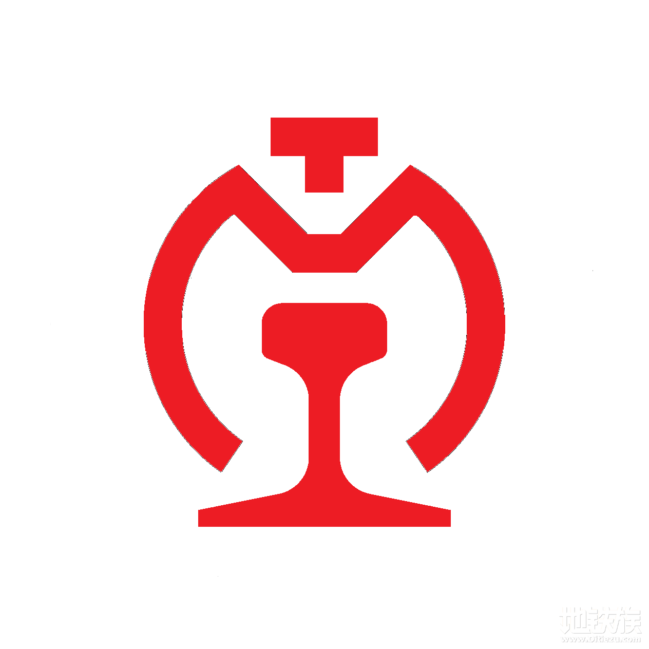 中文（中国大陆）: 天津地铁老标志